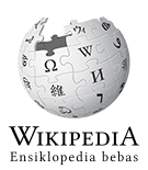 Wikipedia logo 2.0 (da)